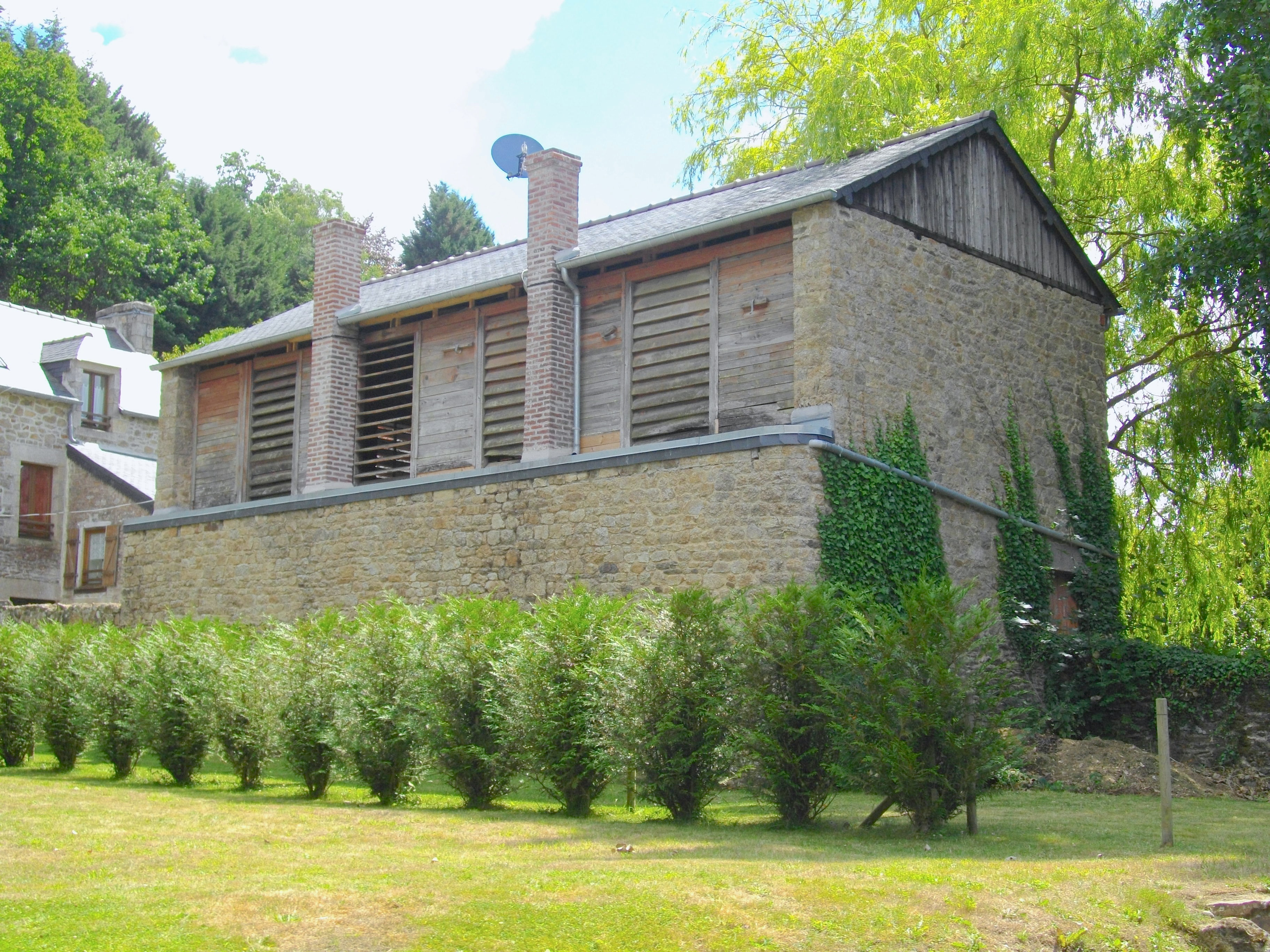 Village de Léhon (Côtes-d'Armor). Ancien grenier-séchoir des lavandières en bord de Rance.